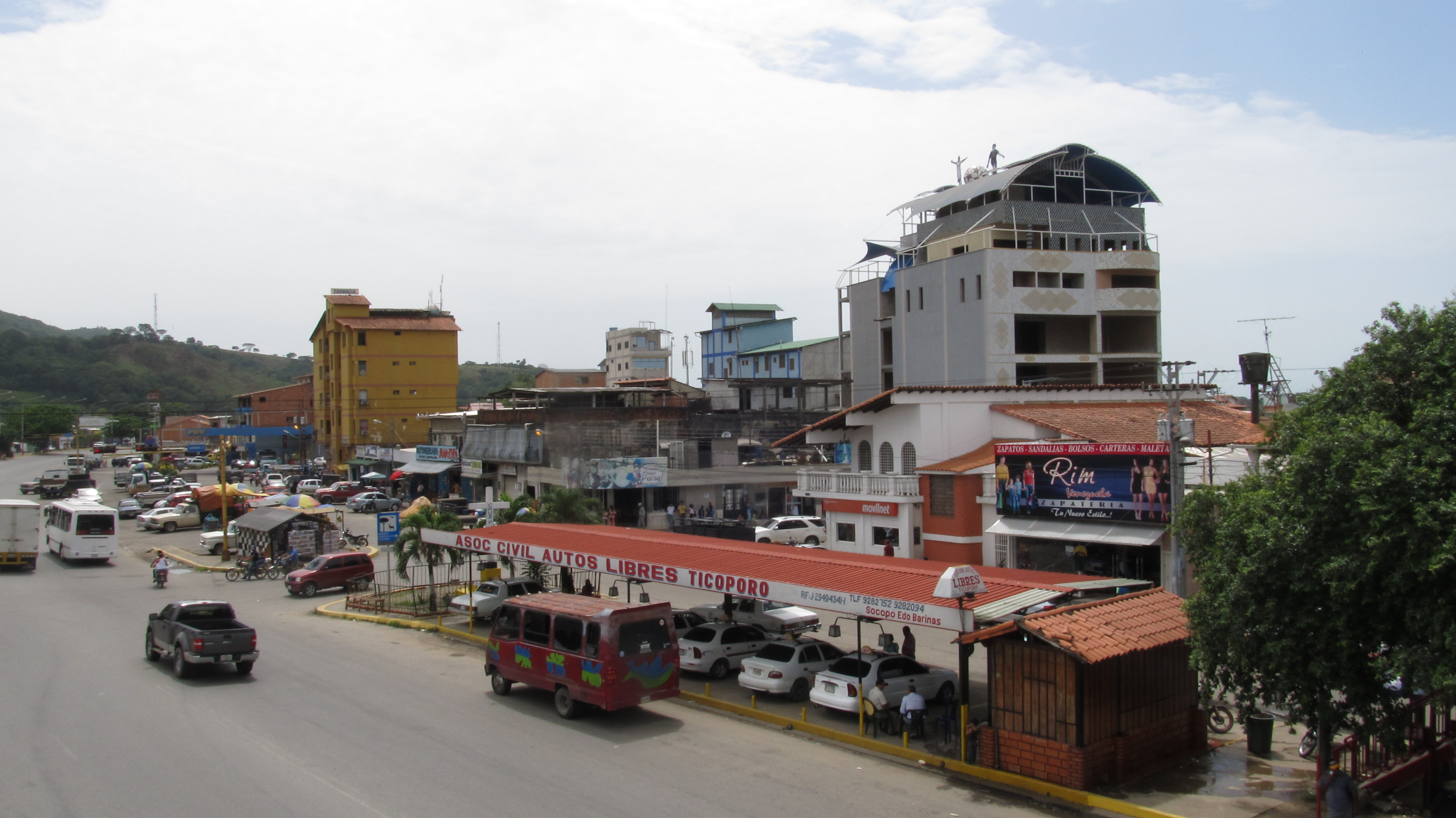 Vista desde la troncal 5 del poblado de Socopó (estado Barinas), Venezuela